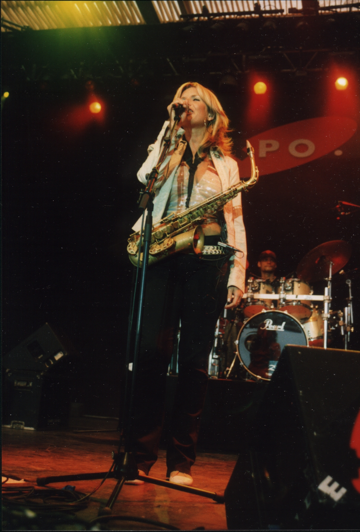 Auftritt von Candy Dulfer auf der Arteplage Neuenburg der Expo.02